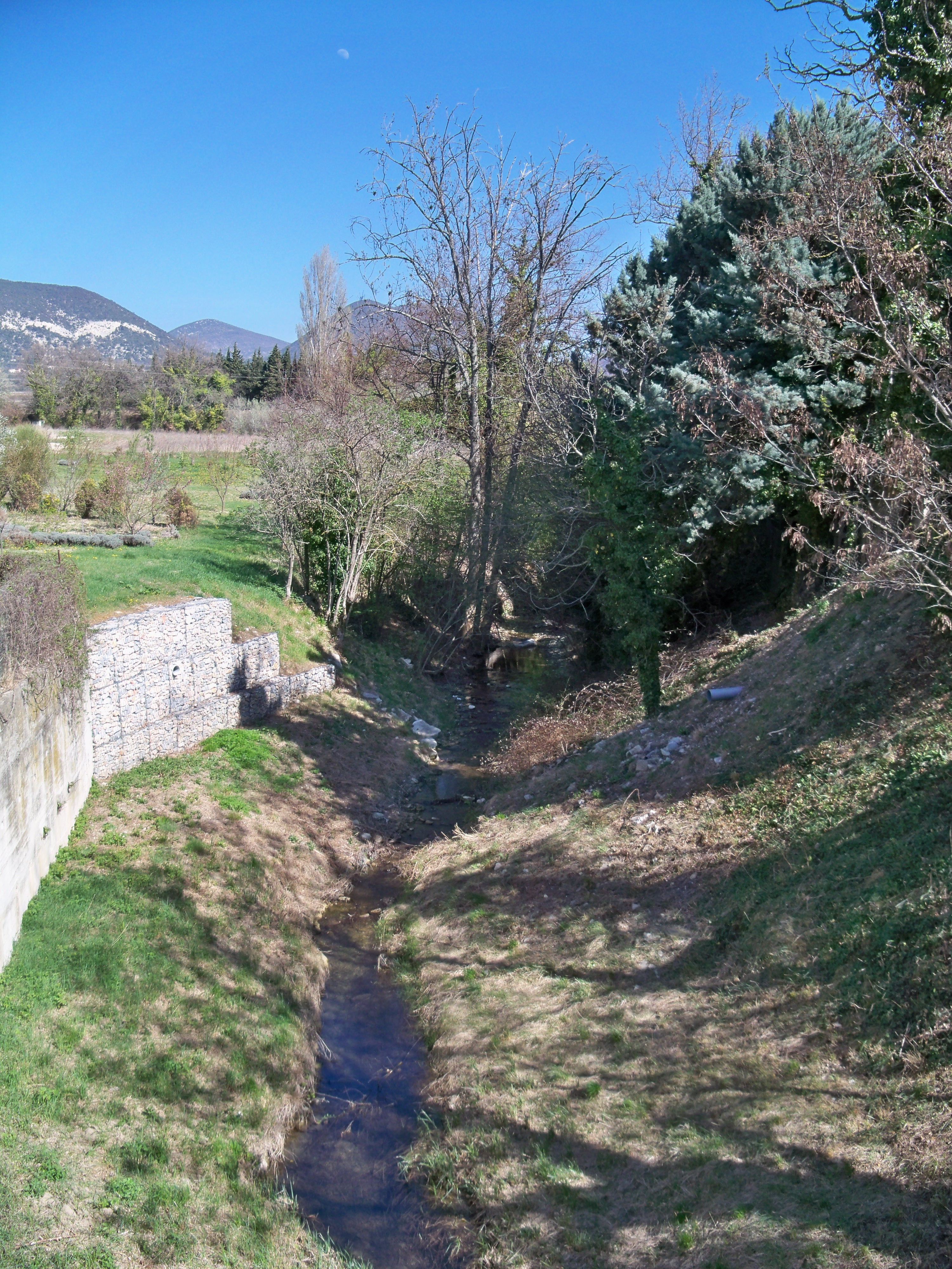 L'Hérin à Saint Pantaléon (26)